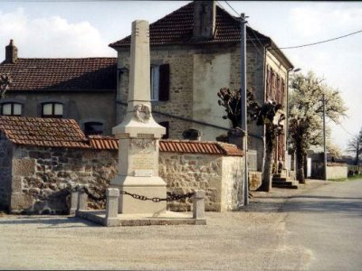 Mairie et monument aux morts de Saint-Avit-le-Pauvre